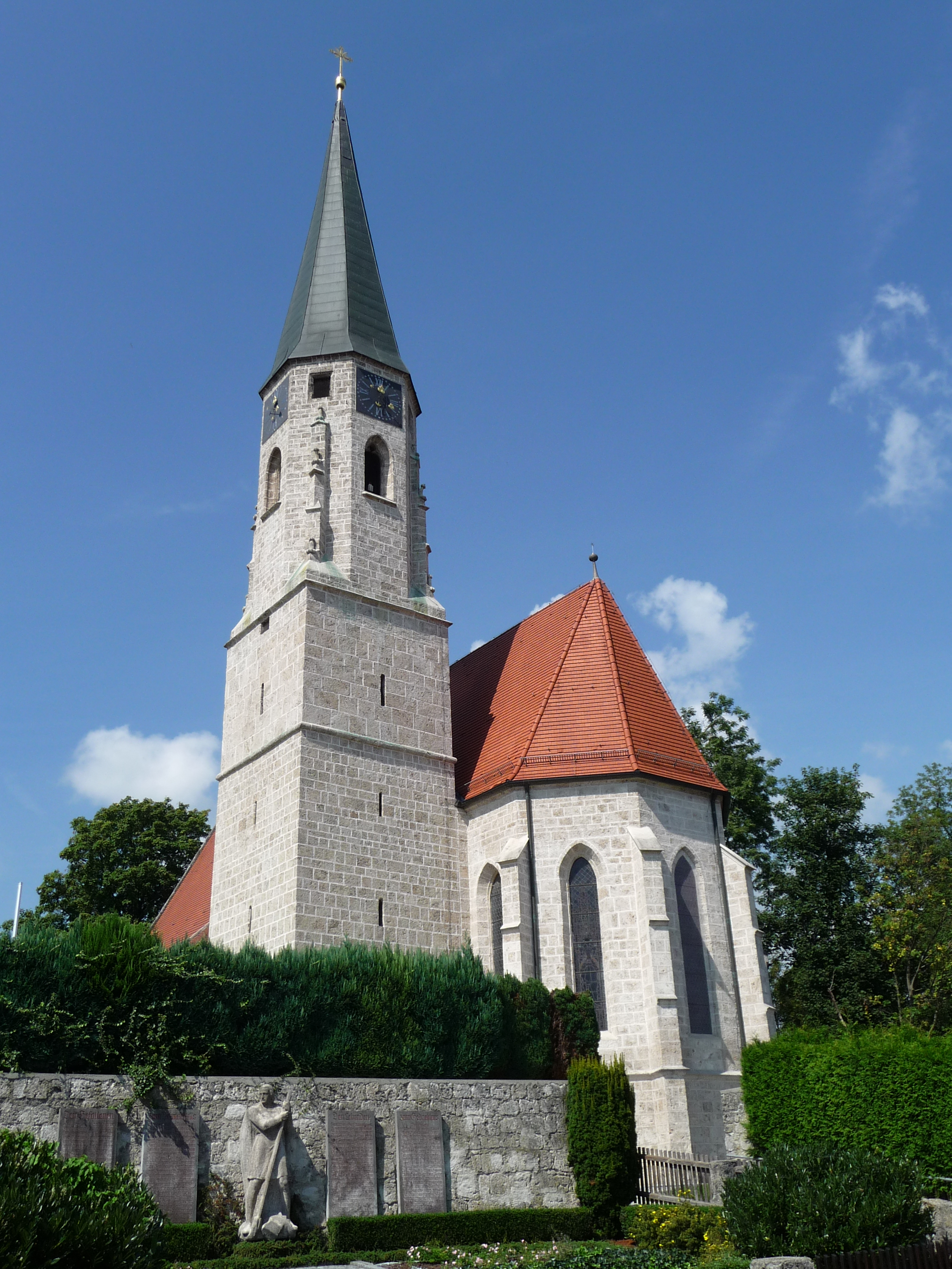 Die Pfarrkirche Maria Himmelfahrt in Ering